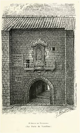 O Arco de Vandoma (La Porte de Vendôme) in COELHO, José Júlio Gonçalves – Notre-Dame de Vendome et les armoiries de la ville de Porto: mémoire historique et archéologique